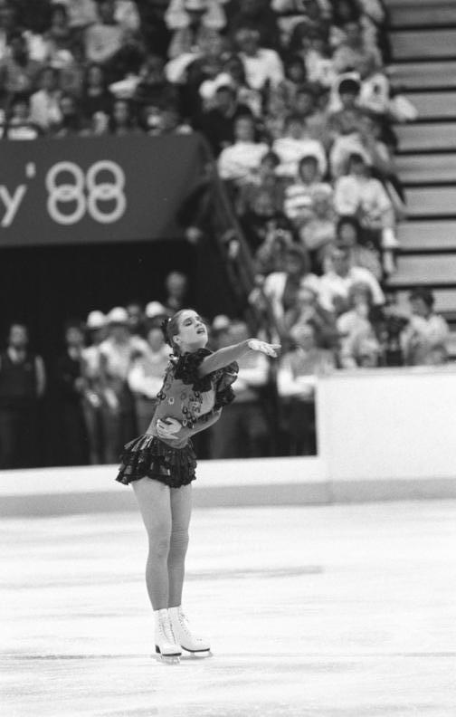 ADN-ZB/Thieme 27.2.1988 Calgary: Olympia 1988 Mit großer Ausstrahlungskraft und Ausdrucksweise interpretiert die Welt- und Europameisterin Katarina Witt die „Carmen“ in ihrer Kür bei der olympischen Entscheidung im Eiskunstlaufen. Die 22jährige Karl-Marx-Städterin gewann die Goldmedaille vor Elizabeth Manley aus Kanada und Debi Thomas (USA).